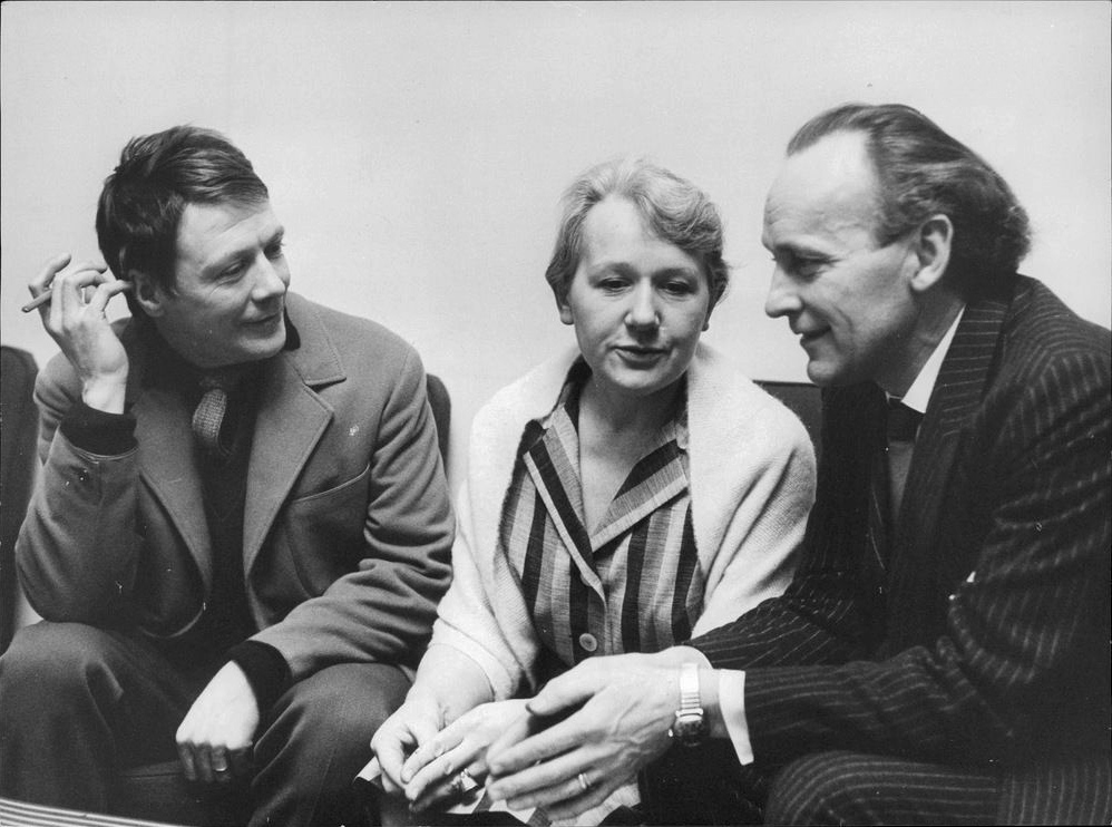 Allan Edwall, Sif Ruud och Hans Strååt diskuterar Max Frischs pjäs "Andorra".